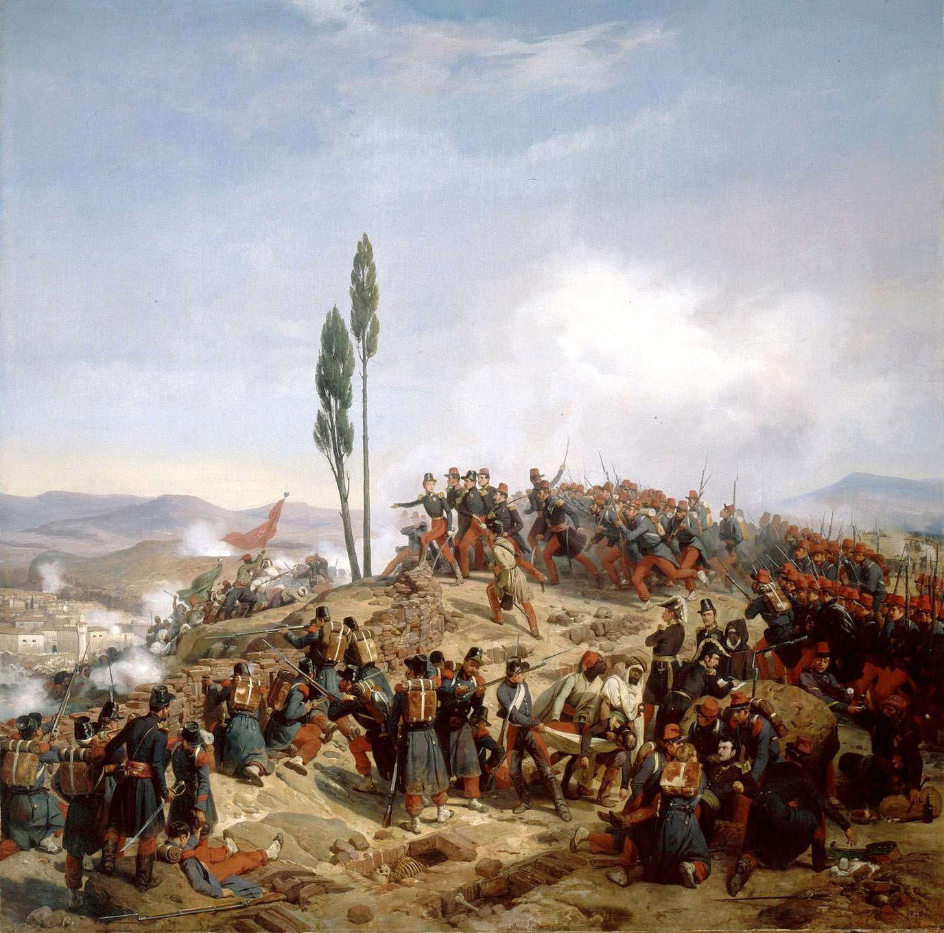 Prise de Constantine - L’ennemi repoussé des hauteurs de Coudiat-Ati - 10 octobre 1837 - Peinture d'Horace Vernet